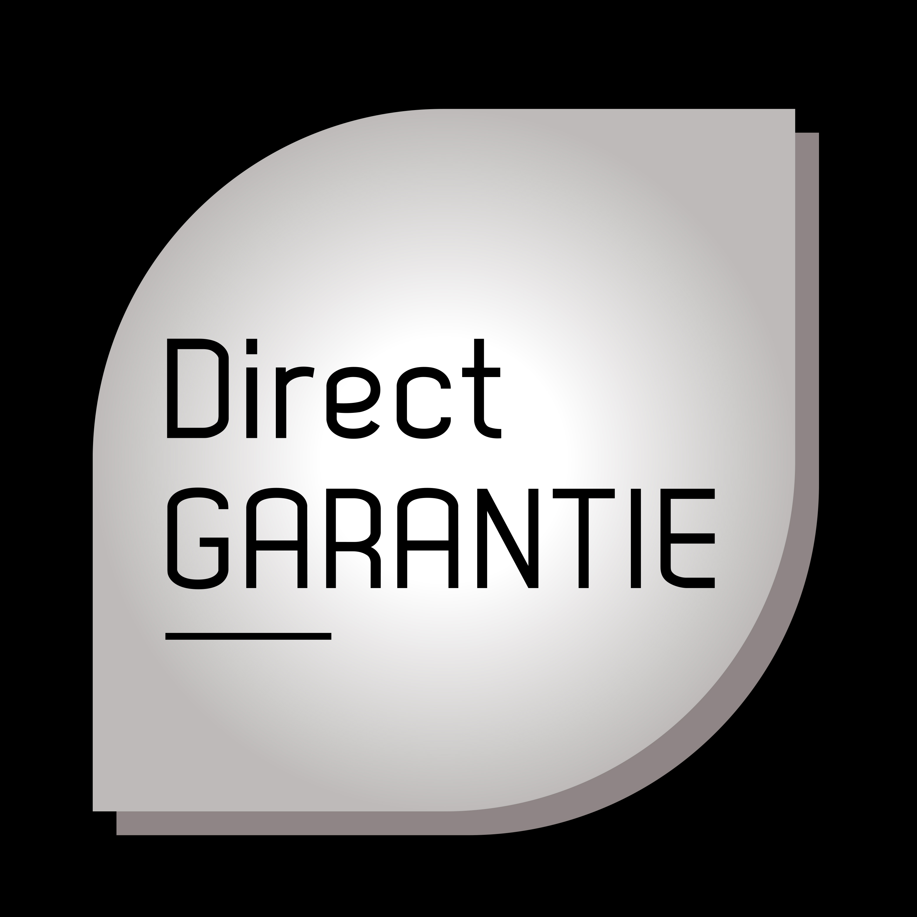 Logo Direct Garantie